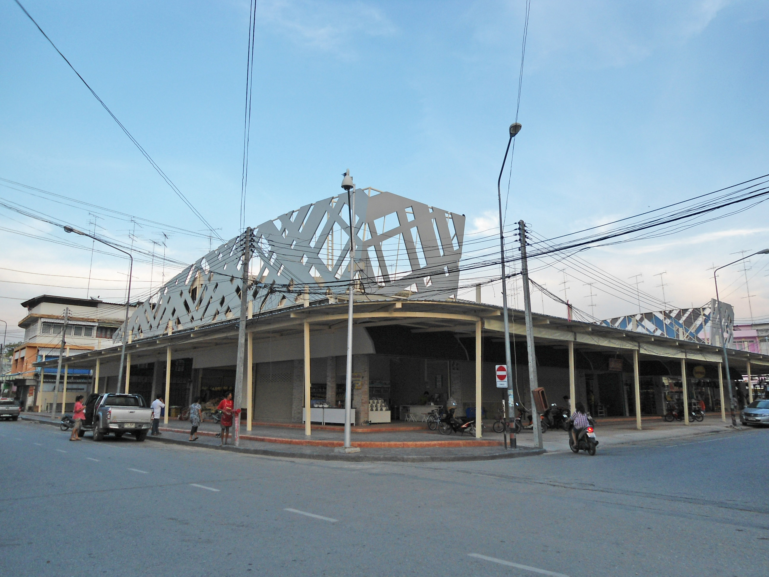 จัตุรัสท่าพระยาจักร